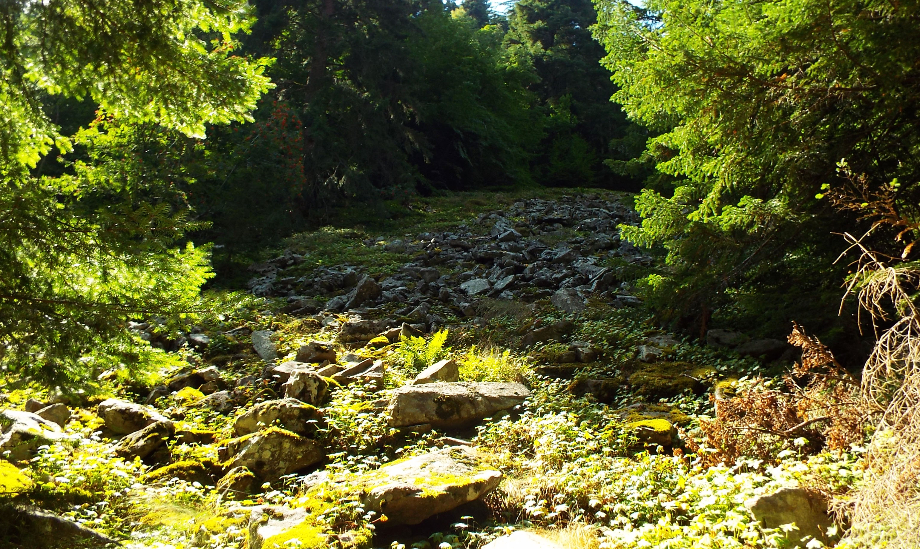 Из "Каньонът на водопадите"